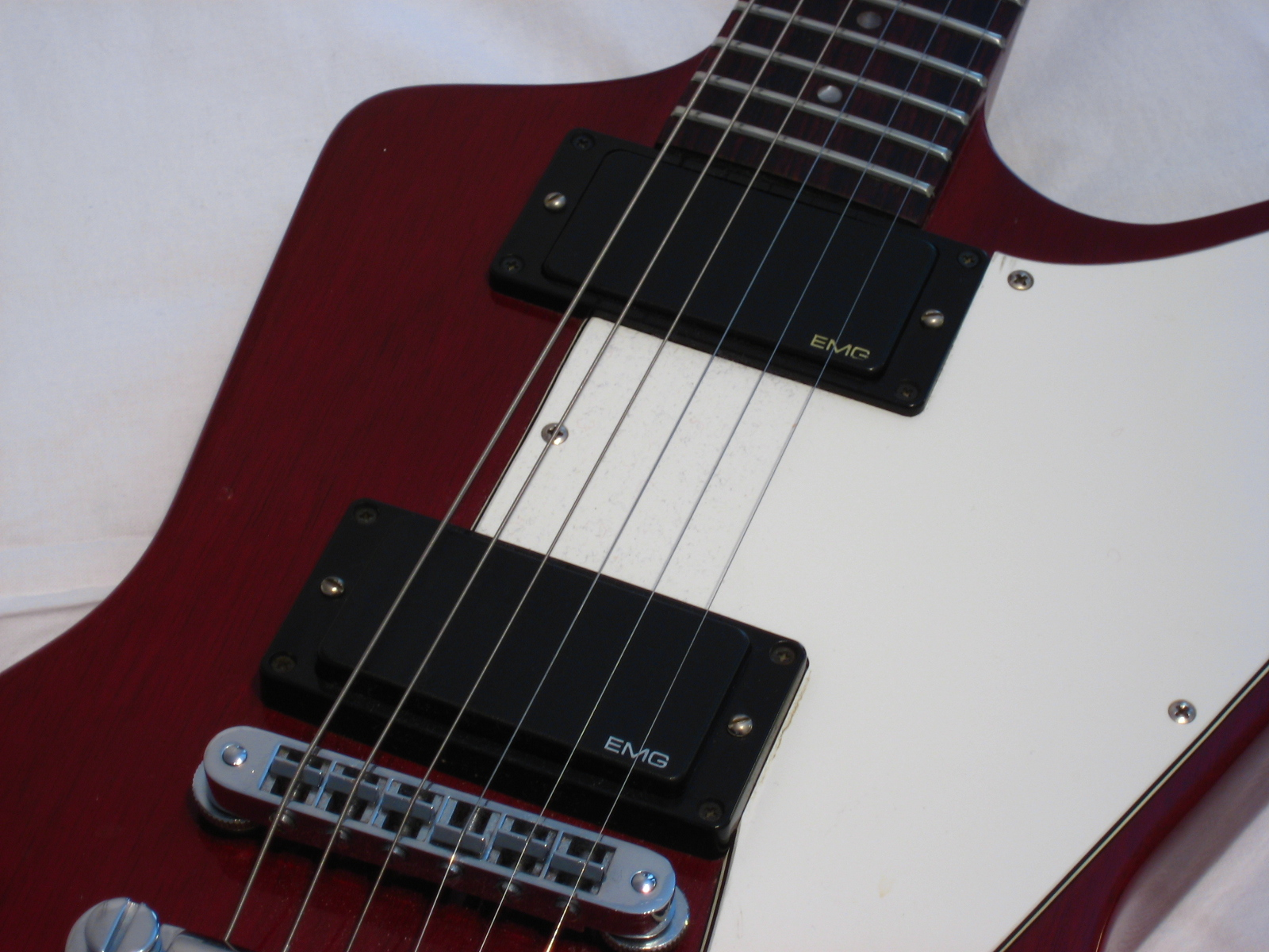 EMG 81 & 85 pickups on Gibson Explorer guitar.